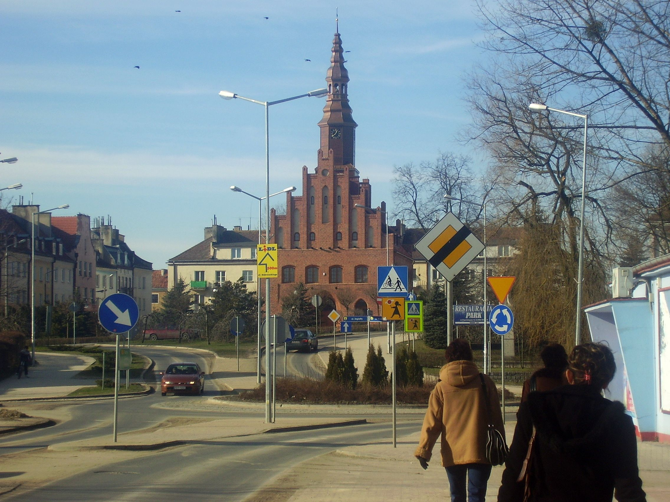 Morąg - stare miasto